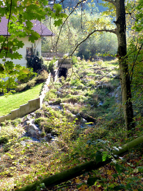 Fischtreppe an der Orrot bei der Renneckermühle in Jagstzell; Bereich knapp außerhalb des Landschaftsschutzgebiets „Speicherbecken Orrot“